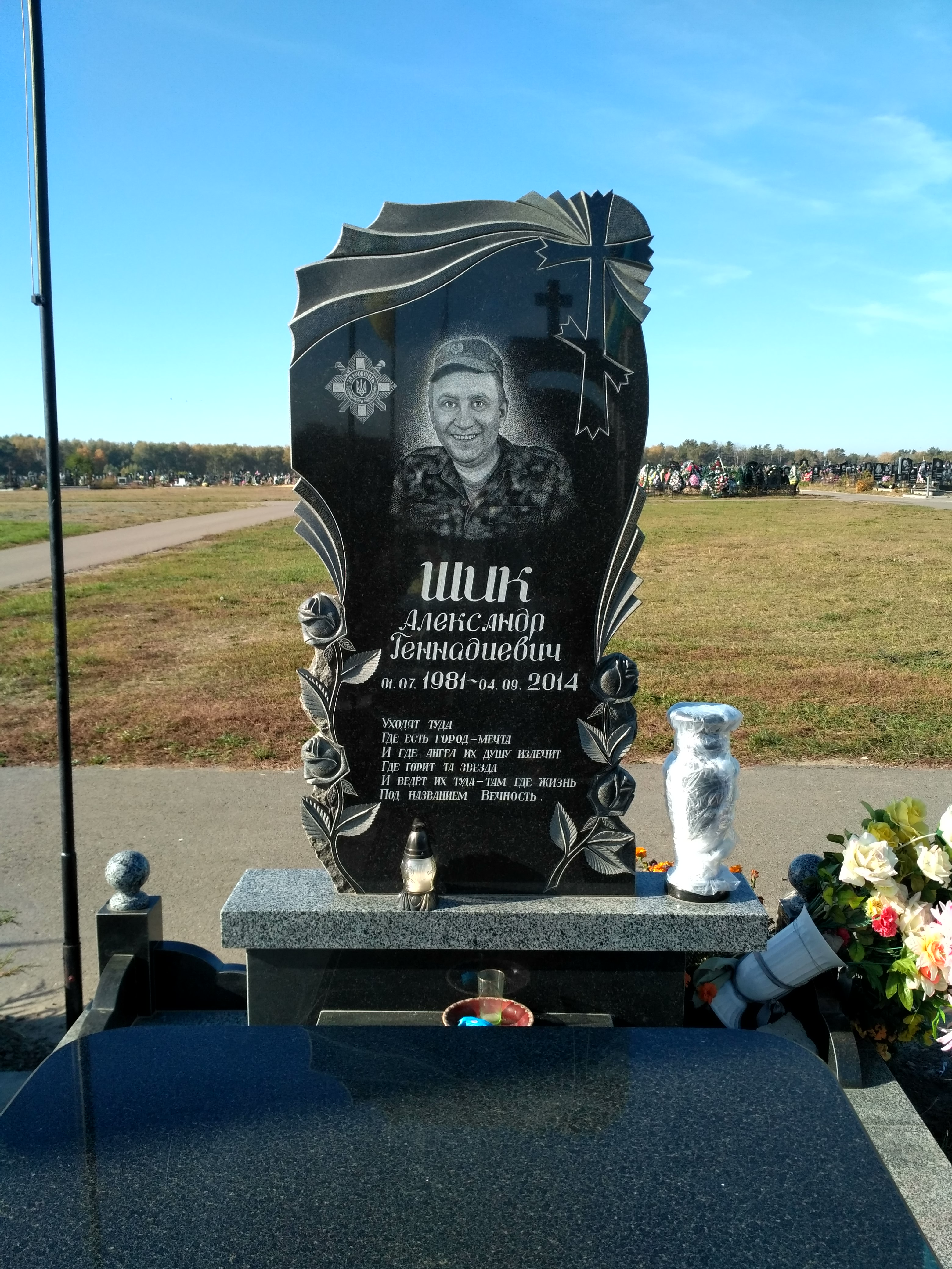 могила